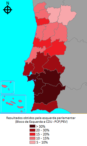 Resultados obtidos pela esquerda parlamentar nas eleições legislativas de 2015.